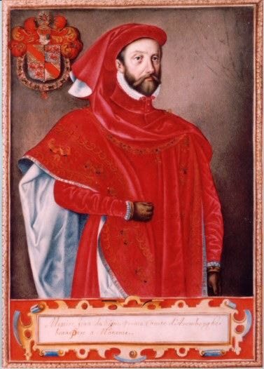 Jean de Ligne, Baron de Barbançon (1524-68)